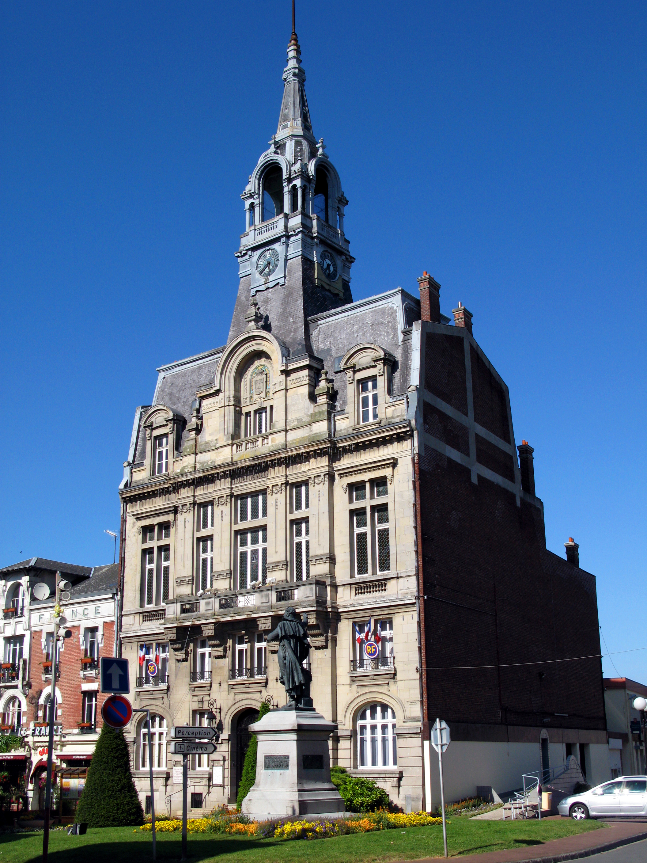 Ham (Somme, France) - Hôtel-de-ville. La statue devant est celle du Général FOY.